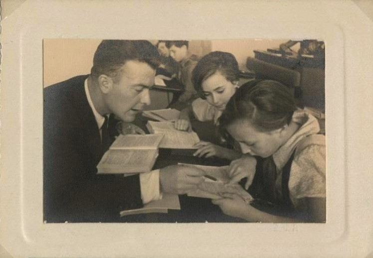 Испанские дети в СССР. Занятия в школе